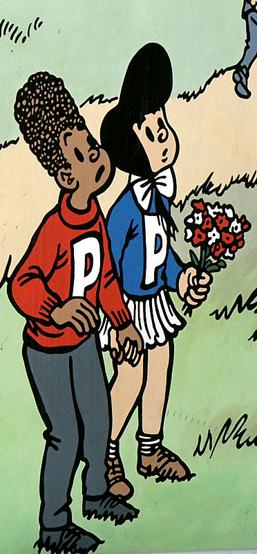 Petoetje en Petatje op de Nero-muurschildering in Brussel